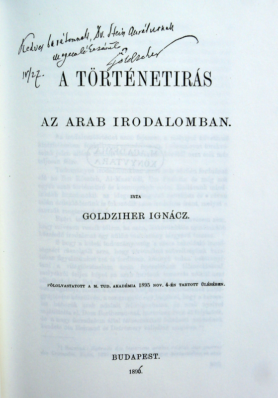 Reproduktion des Titelblattes einer wiss. Schrift aus 1897